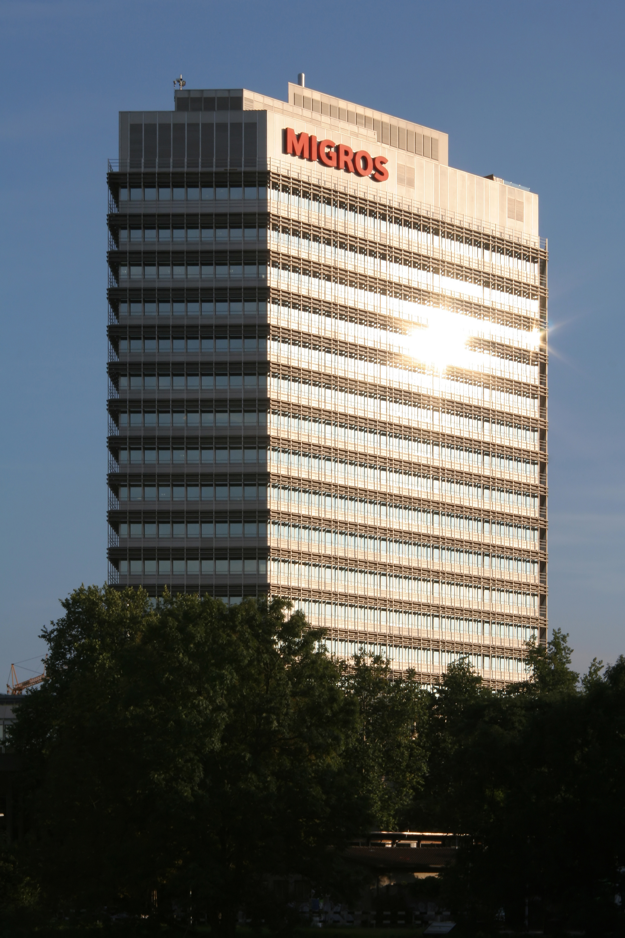 Hochhausgebäude und Hauptsitz der Migros Schweiz in Zürich